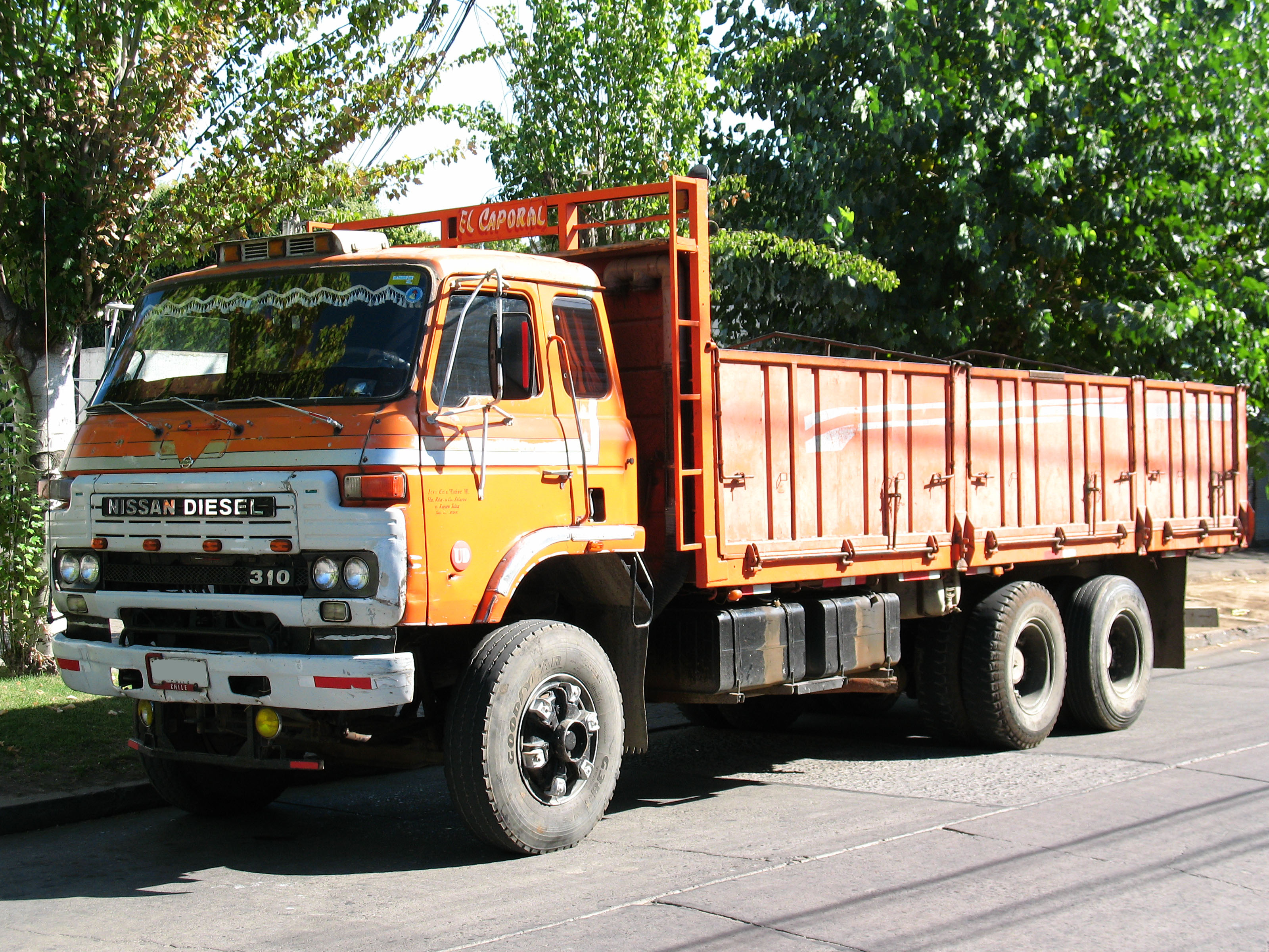 Nissan Diesel UD 310 1983